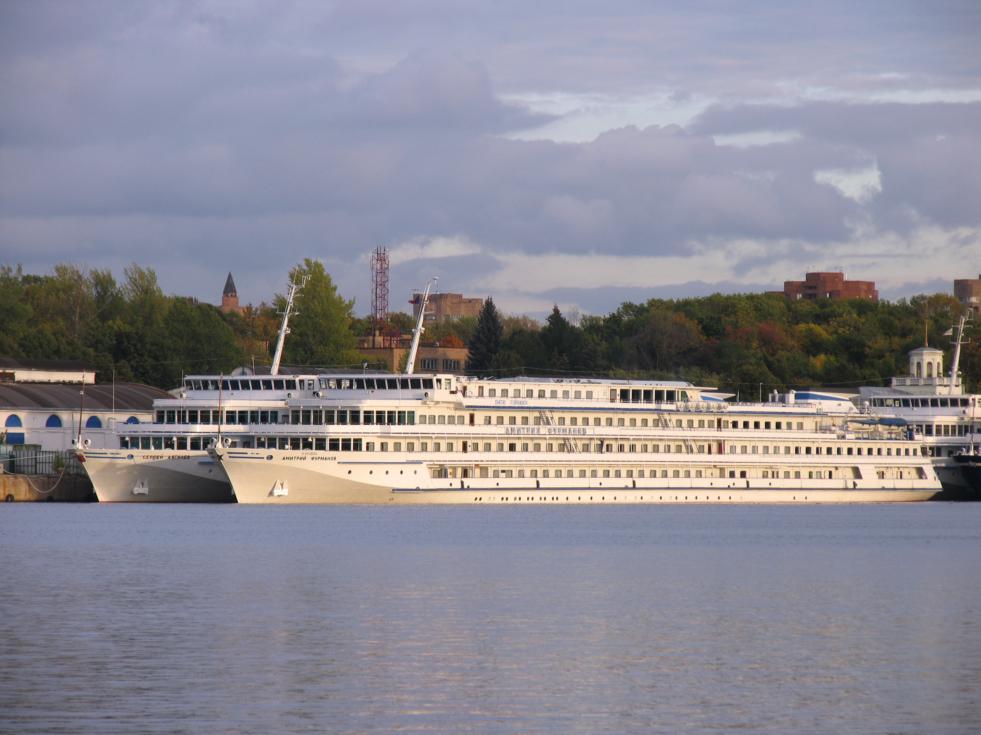 Речное круизное судно "Дмитрий Фурманов" в Северном речном порту. Слева стоит однотипное судно "Сергей Дягилев". Москва.